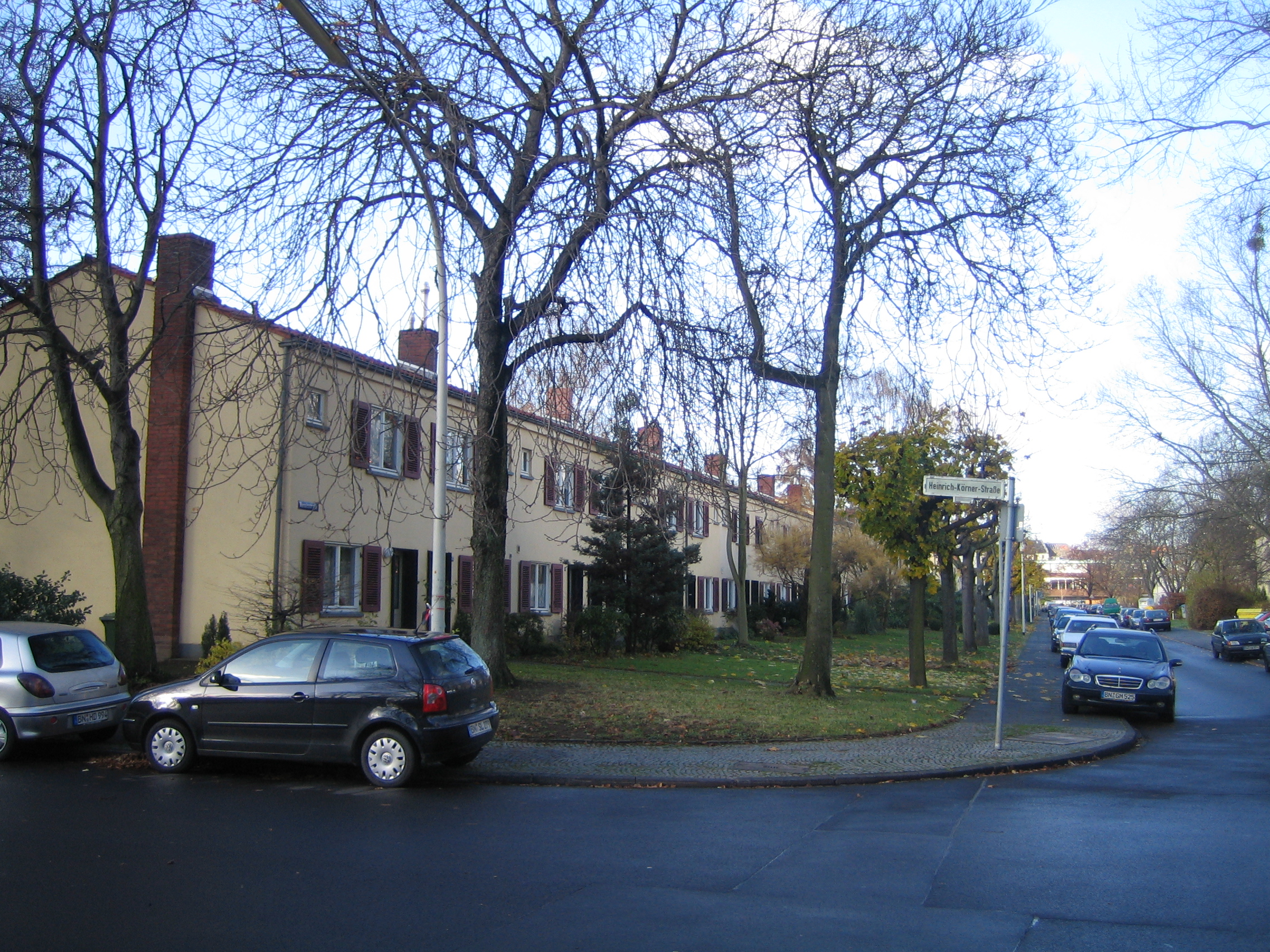 Reutersiedlung Bonn - Blick auf die Renoisstraße - unter Denkmalschutz - Erbaut 1949-1952 von Prof Max Taut, Berlin